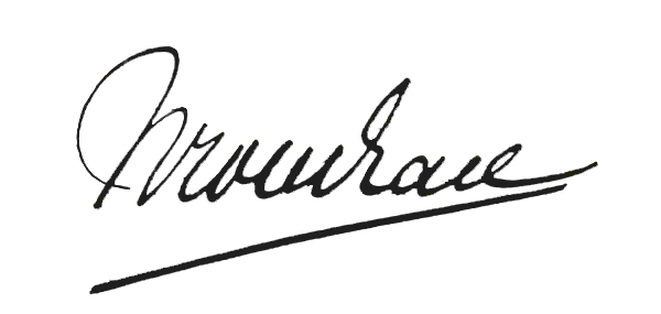 Nicolaas Rondaij signature.